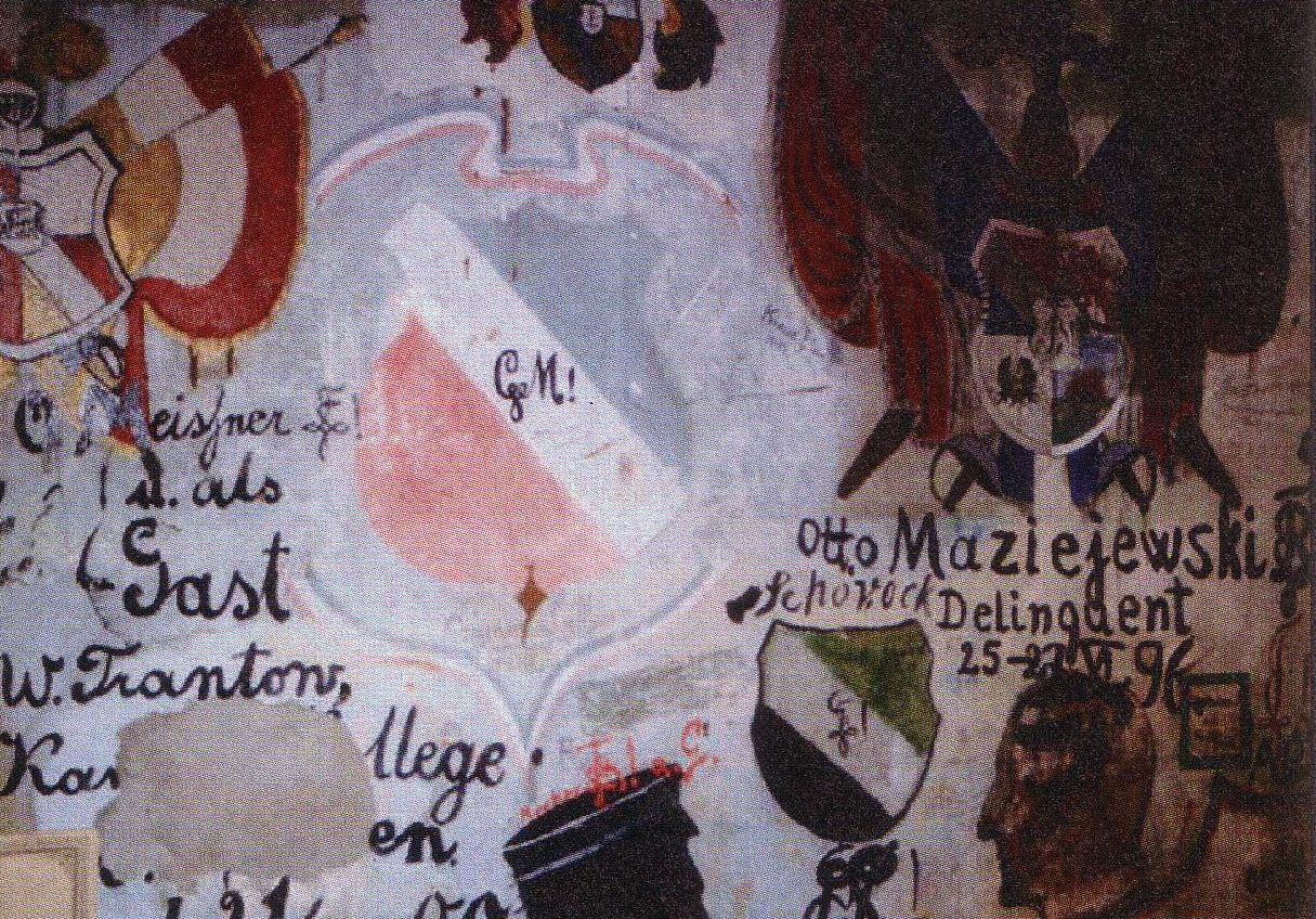 Fotografie einer Wand im Karzer der Ernst-Moritz-Arndt-Universität Greifswald: Farben und Zirkel des Corps Masovia, gemalt von Paul Czymmeck (1870–1902) im April 1893